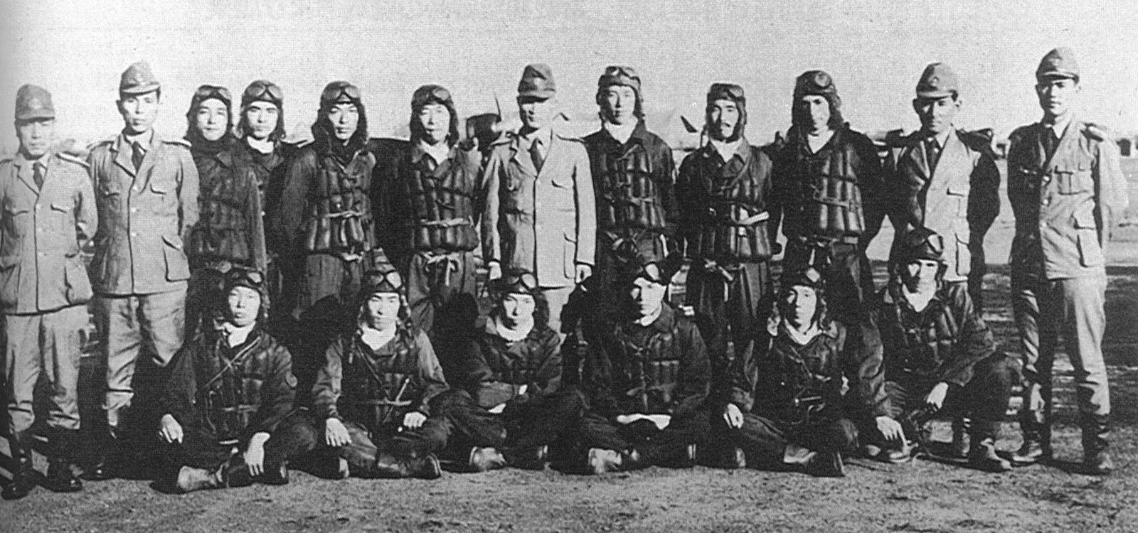 1940年9月13日、零戦の初陣を飾って漢口に帰還した搭乗員と12空幹部。前列左より、光増正之1空曹、平本政治3空曹、山谷初政3空曹、末田利之2空曹、岩井勉2空曹、藤原喜平2空曹。後列左より、横山保大尉、飛行長:時永縫之助中佐、山下小四郎空曹長、大木芳男2空曹、北畑三郎1空曹、進藤三郎大尉、司令:長谷川喜一大佐、白根斐夫中尉、高塚寅一1空曹、三上禧二2空曹、飛行隊長:箕輪三九馬少佐、伊藤俊隆大尉。